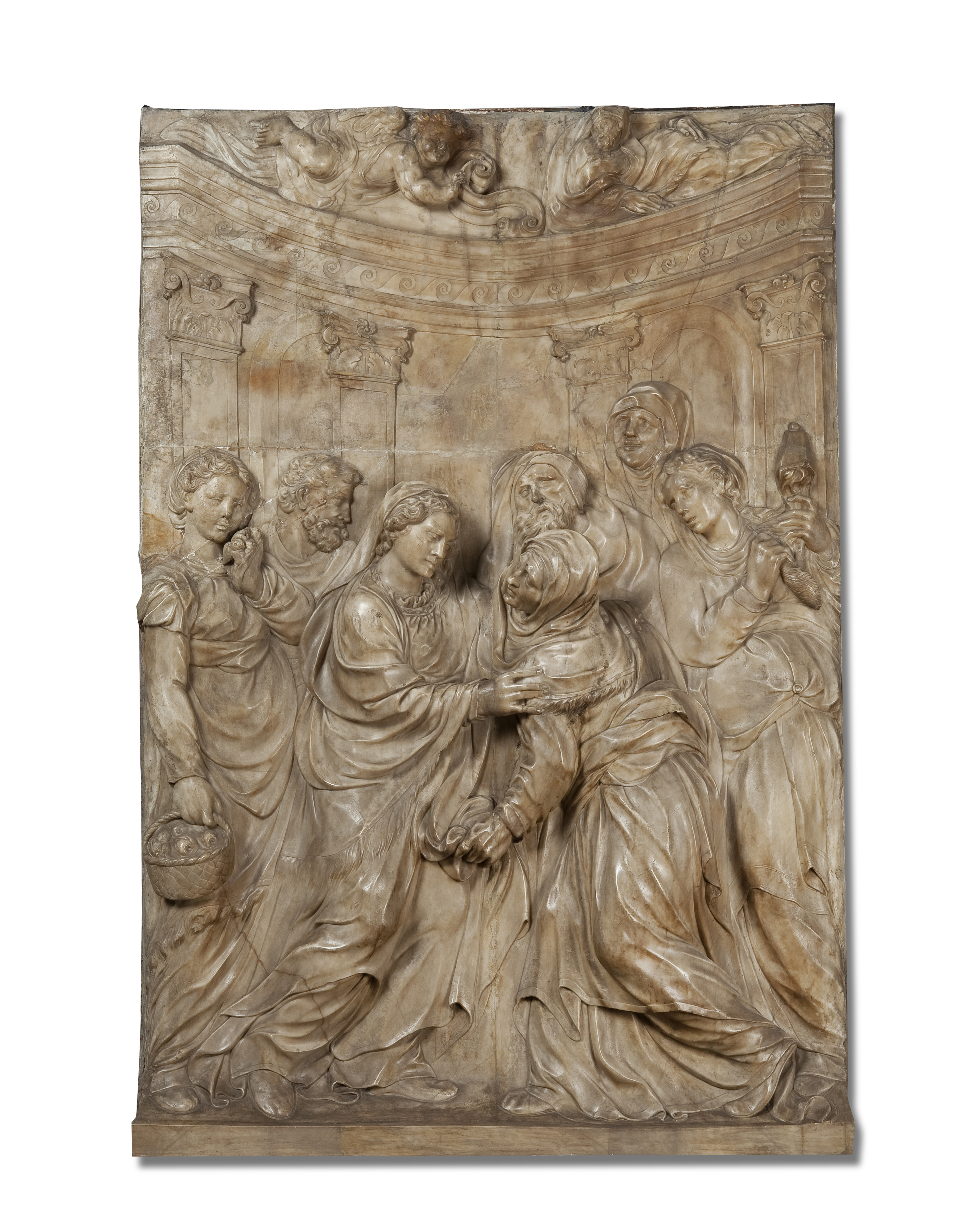 Relleus vida de la Verge - Visitació